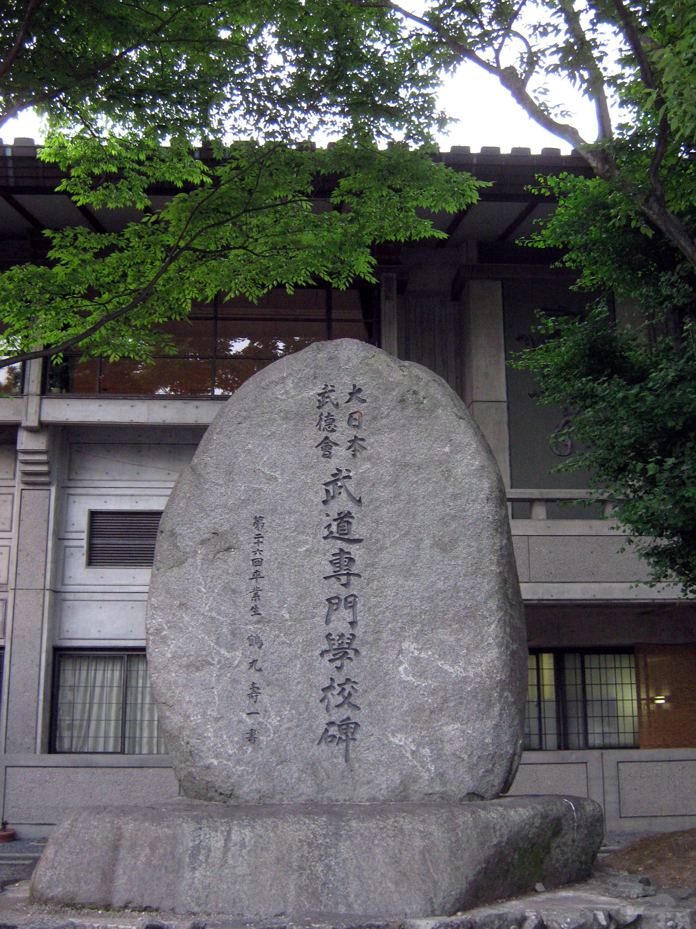 武道専門学校碑（京都市左京区）